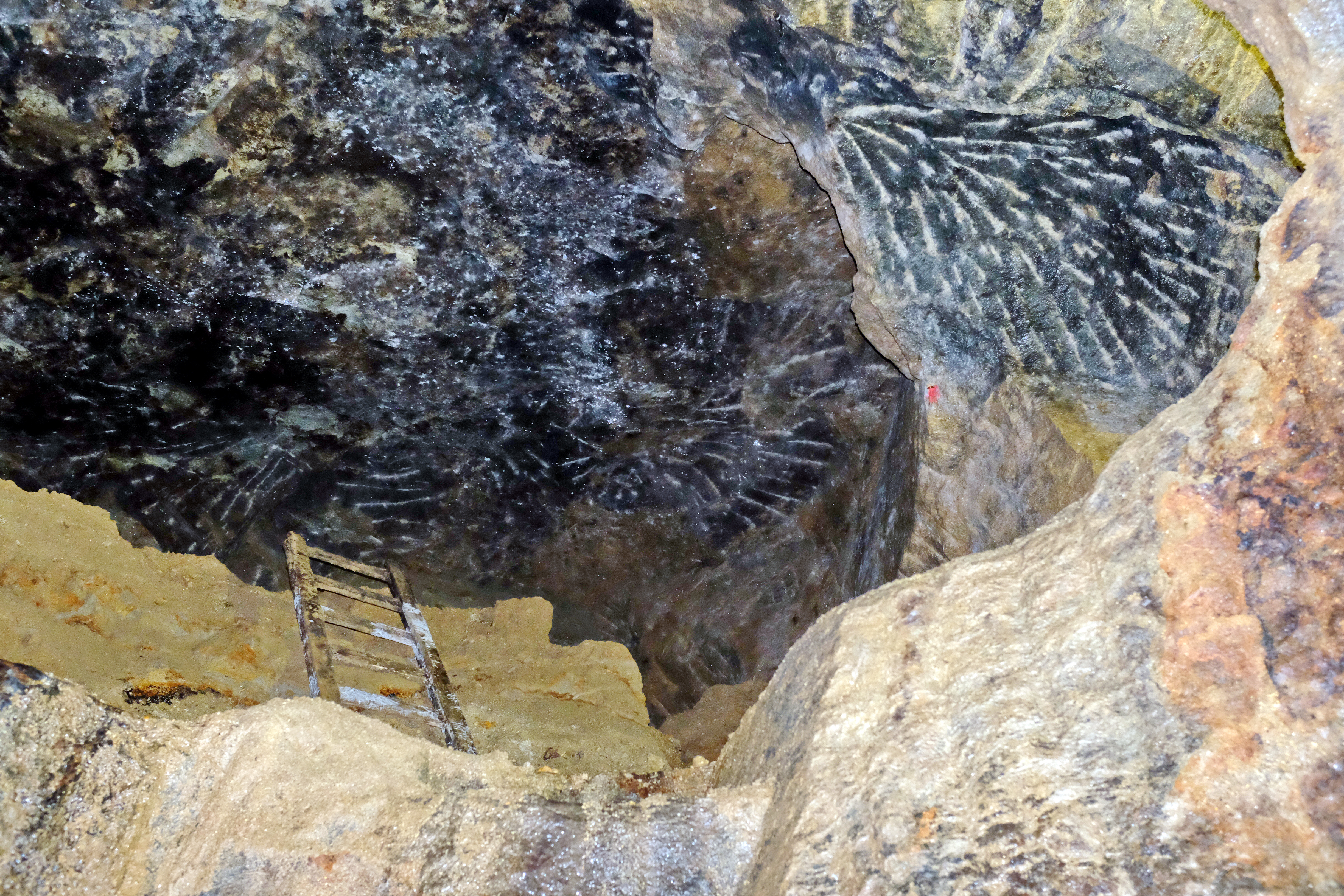 Cínový důl Jeroným, Čistá (Rovná). Komora se stopami po hornickém želízku.